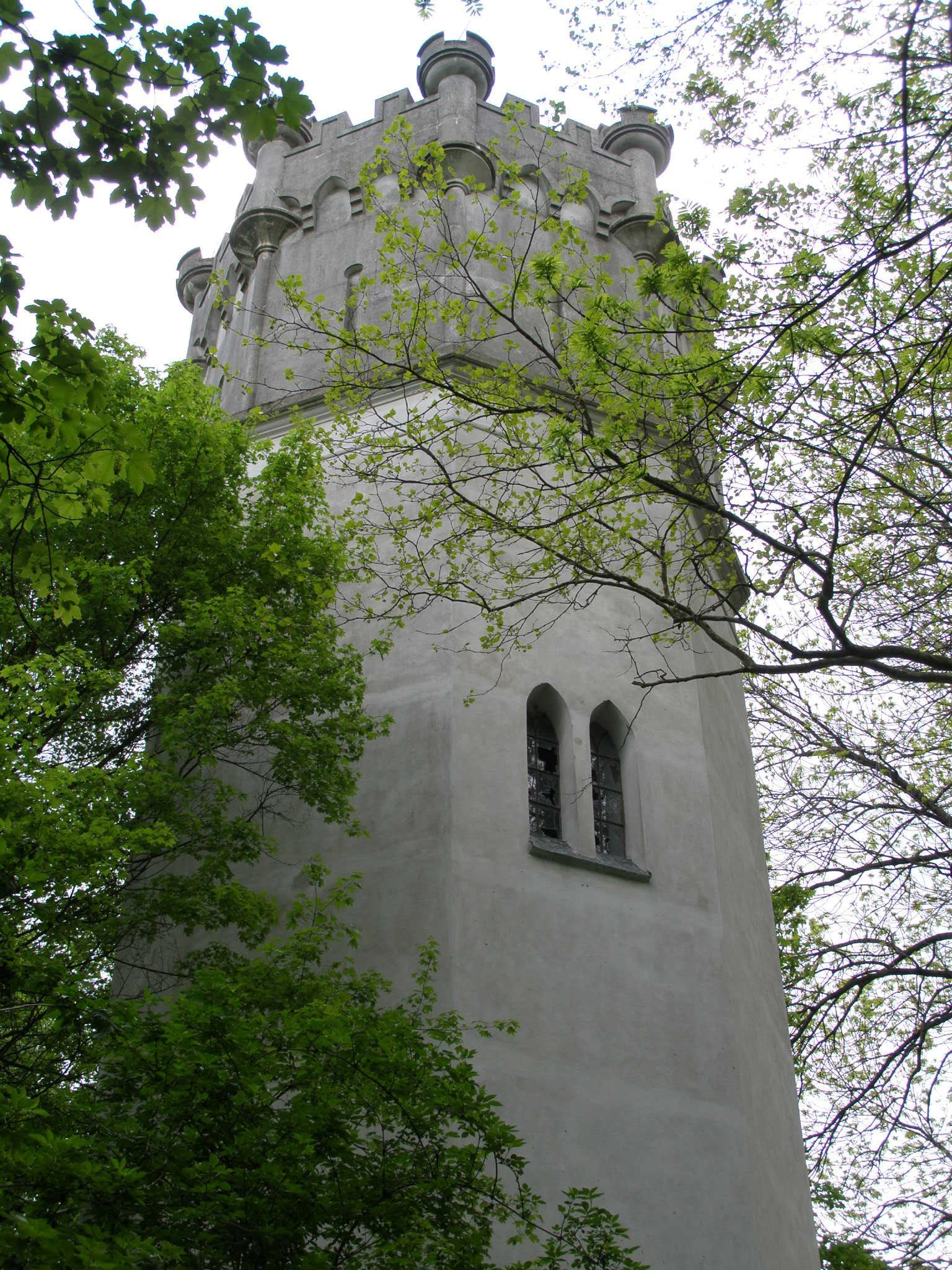 Rusovce - vodárenská veža „minaret“ v parku kaštieľa